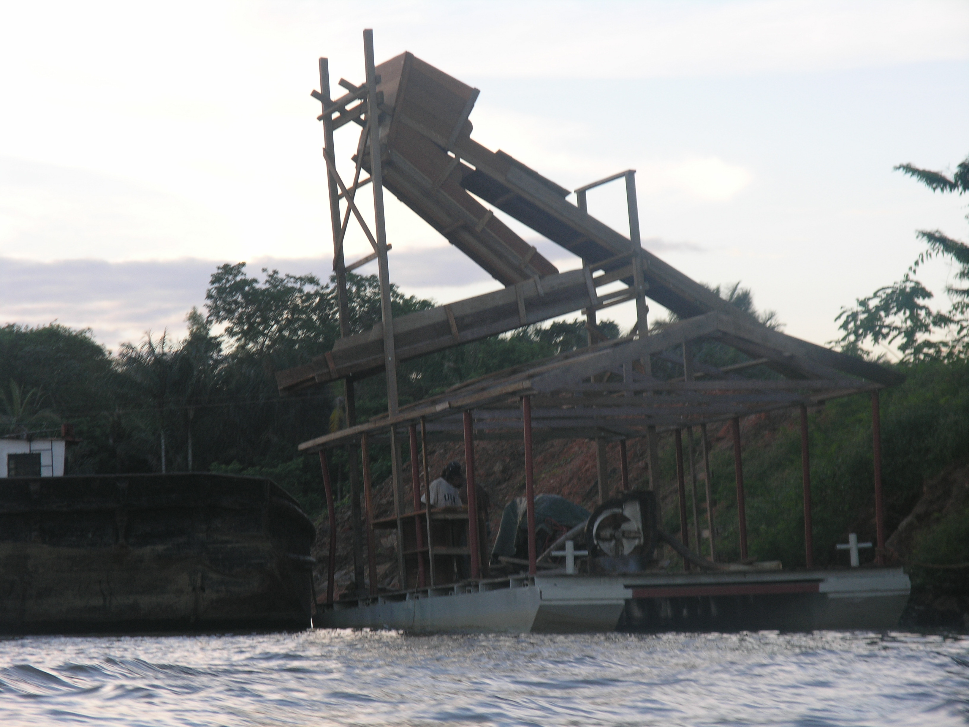 Barge_d'opaillage_artisanal_(Albina-Maroni-Suriname).jpg